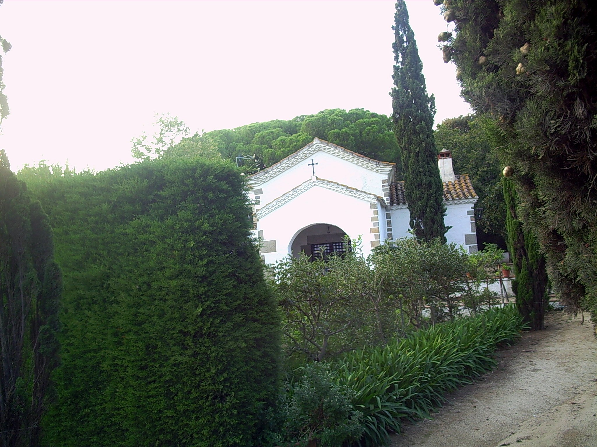 Esglèsia de Santa Anna, esmentada per primer cop l'any 987, a Premià de Dalt, el Maresme, (Catalunya).